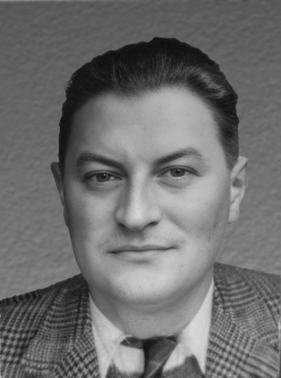 On voit Maurice Fombeure en noir et blanc. Il a un costume.